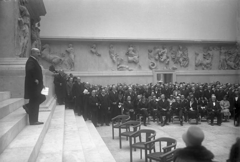 Die Hundertjahrfeier der Berliner Museen! Die feierliche Übergabe des Pergamon-Saales, der nach 20-jähriger Bauzeit vollendet worden ist. Prof. Waetzoldt, der Leiter der Berliner Museen, hält die Eröffnungsrede vom Altar des Pergamon.